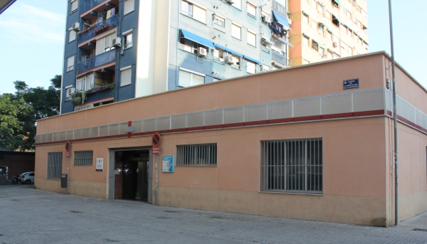 Imagen exterior del centro de salud Fuensanta, de Valencia (Spain)